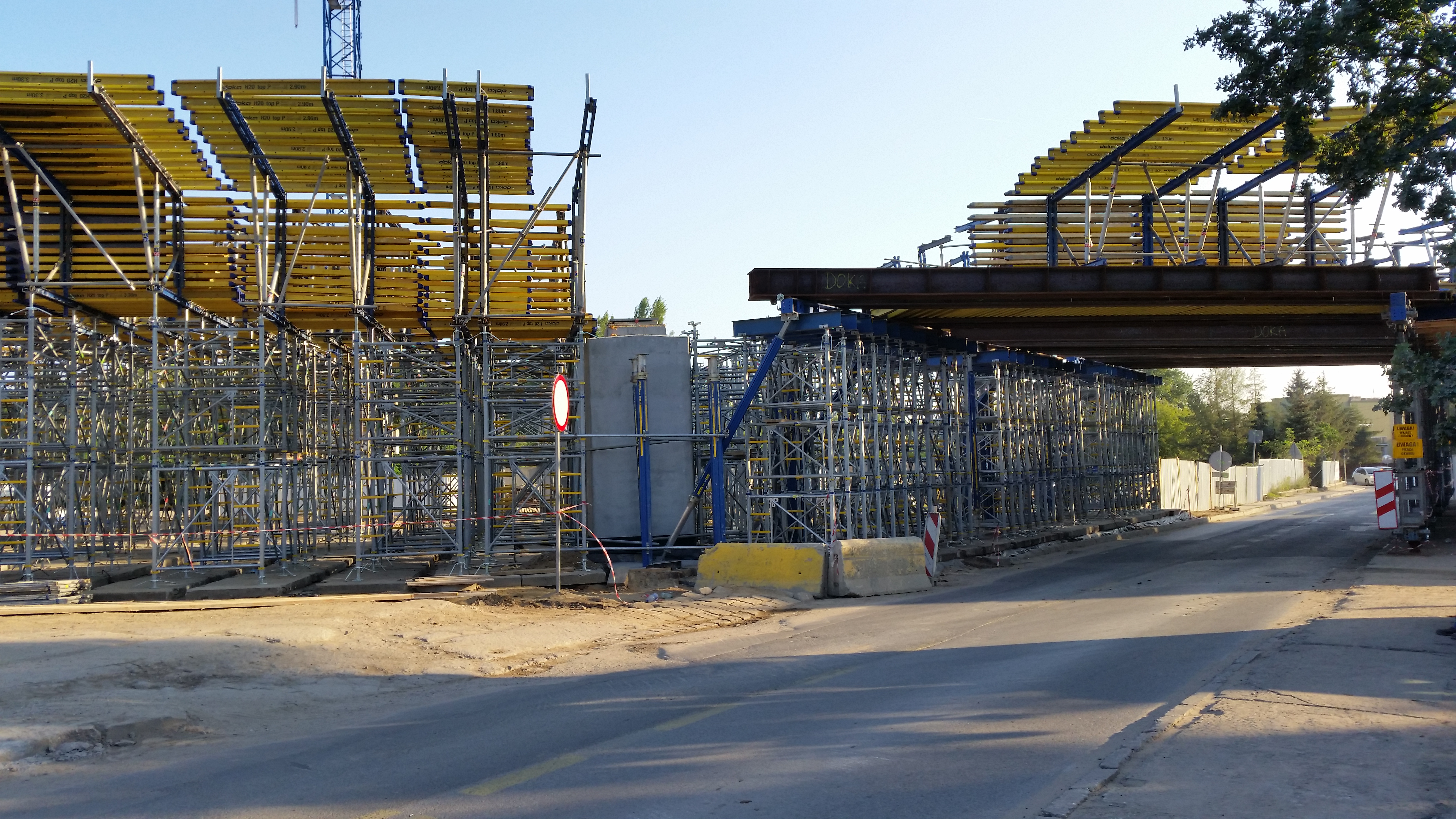 Obiekt ES-1 nad ul. Ząbkowską w Markach, Obwodnica Marek